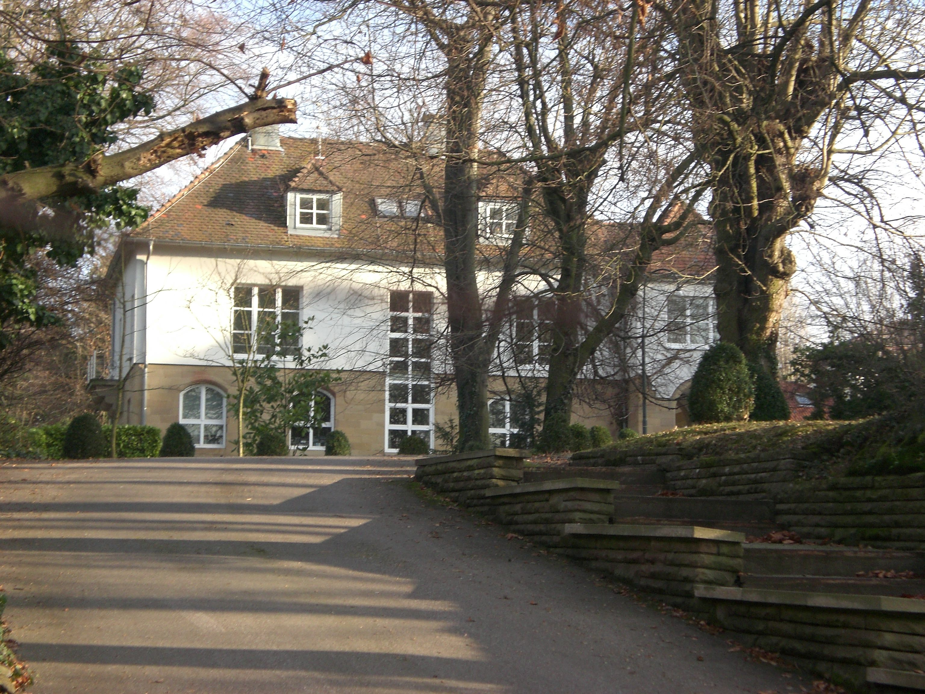 Früheres Wohnhaus von Alexander Knorr in der Gutenbergstraße 39/1 in Heilbronn